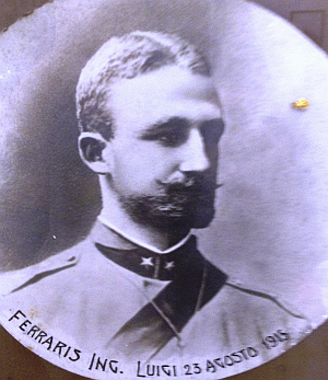 Luigi Ferraris, calciatore del Genoa, militare e ingegnere in divisa da militare nel 1915.